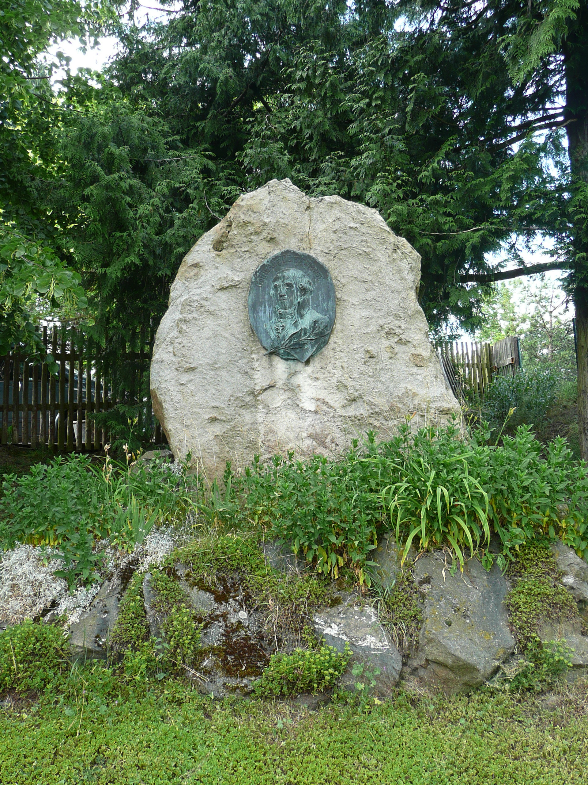 Das 1903 eingeweihte Bürgerdenkmal in Molmerswende